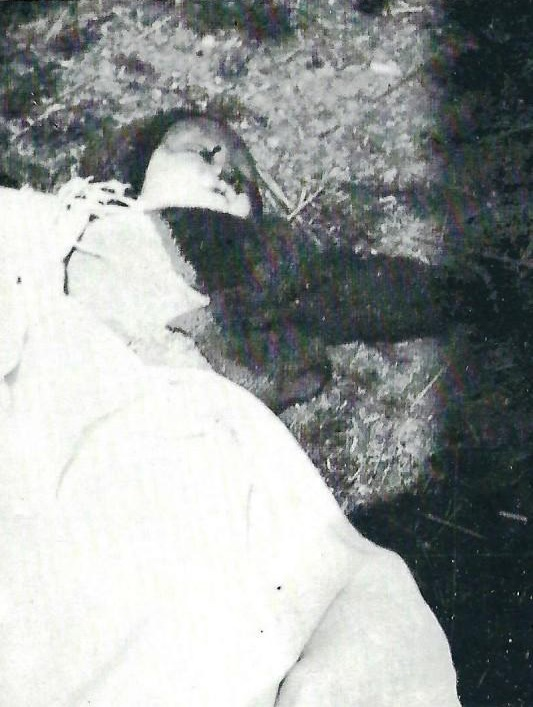 Il cadavere di Viviano Gambineri, vittima della strage di Vallucciole